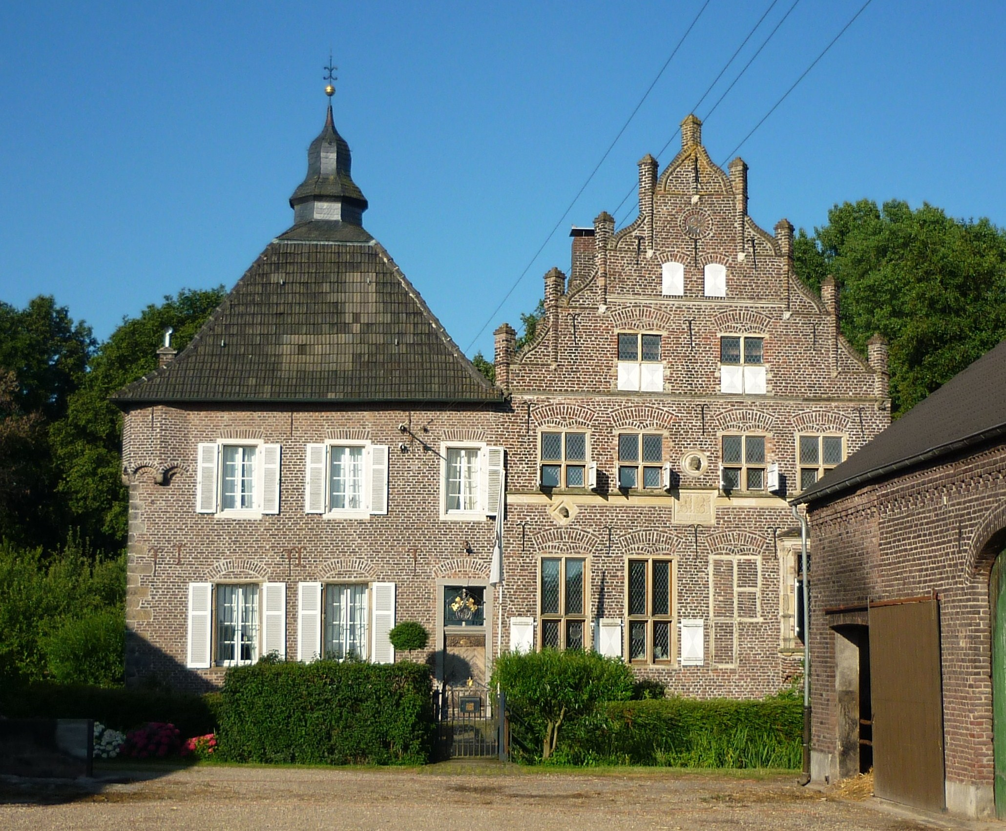 Haus Steinfunder, An Haus Steinfunder 7, Schmalbroich, Kempen This image shows a heritage building in Germany, located in the North Rhine-Westphalian city Kempen (no. 12).